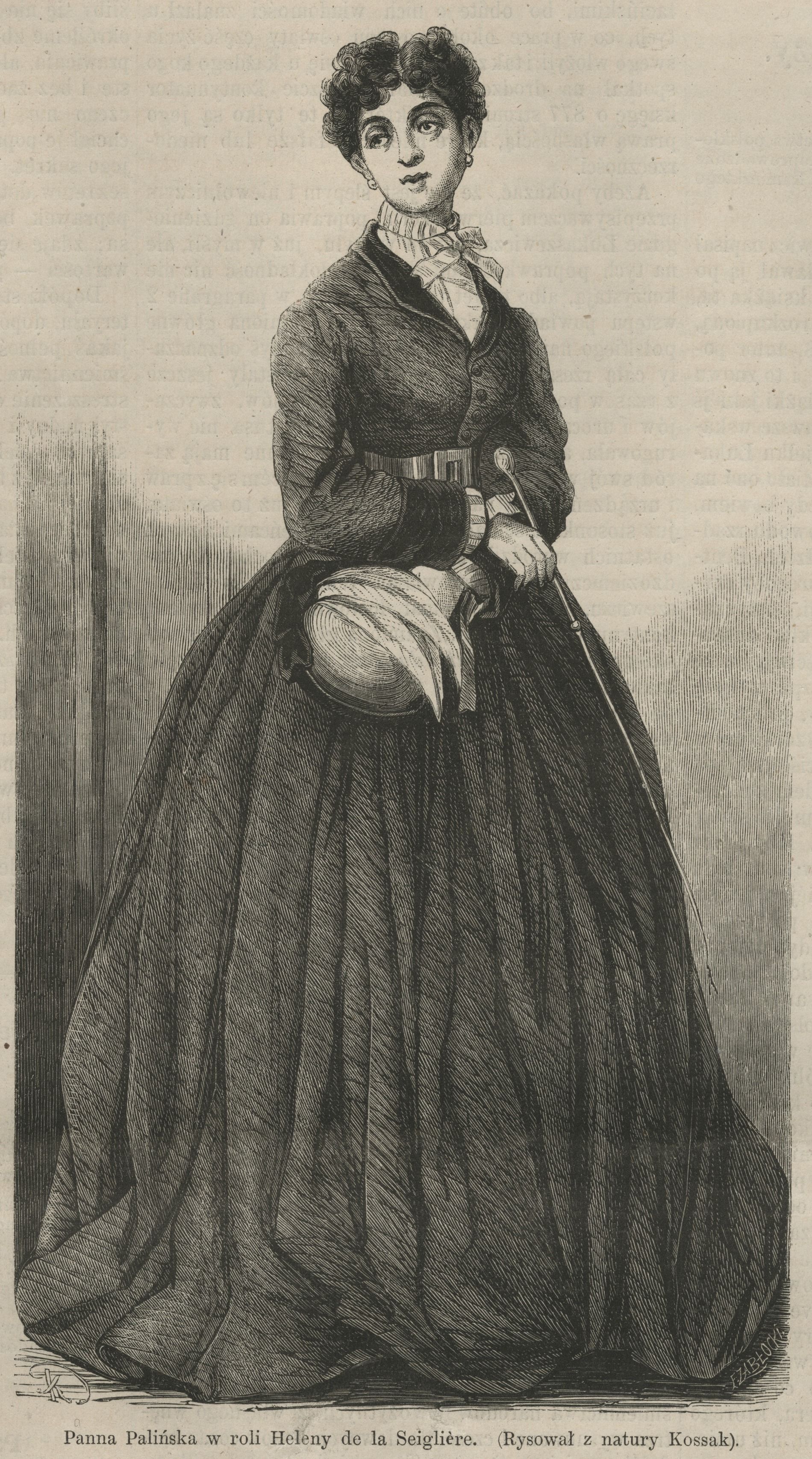 Panna Palińska w roli Heleny de la Seigliere : (Rysował z natury Kossak)